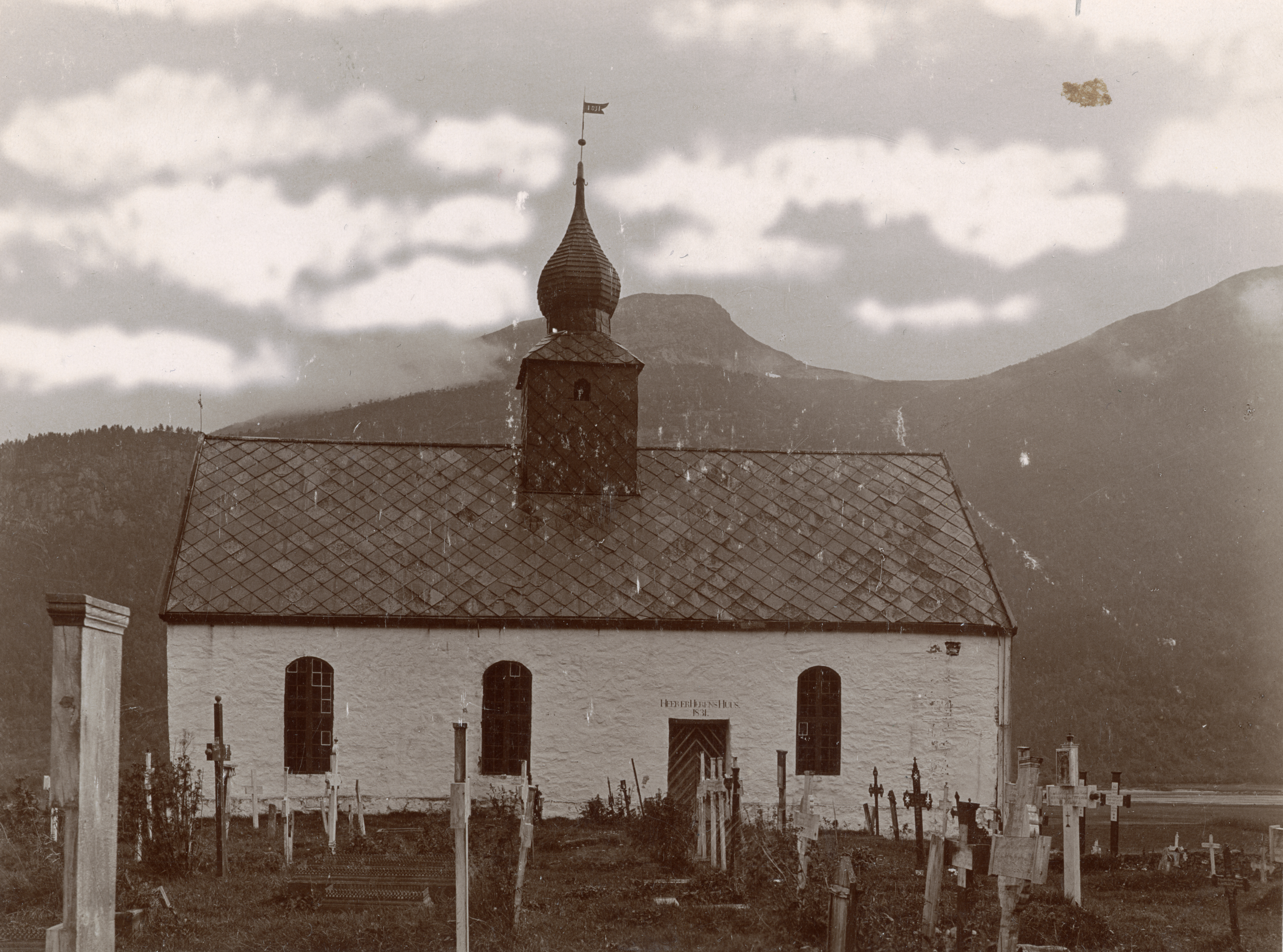 Hen kirke i Hen, Møre og Romsdal Nord fasade før 1901.